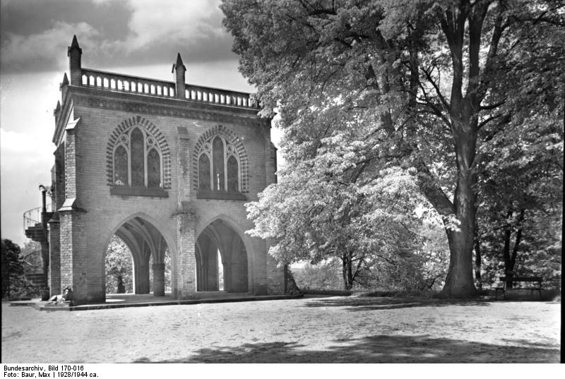 Potsdam.- Park Babelsberg - Gerichtsgebäude (Roter Backstein)